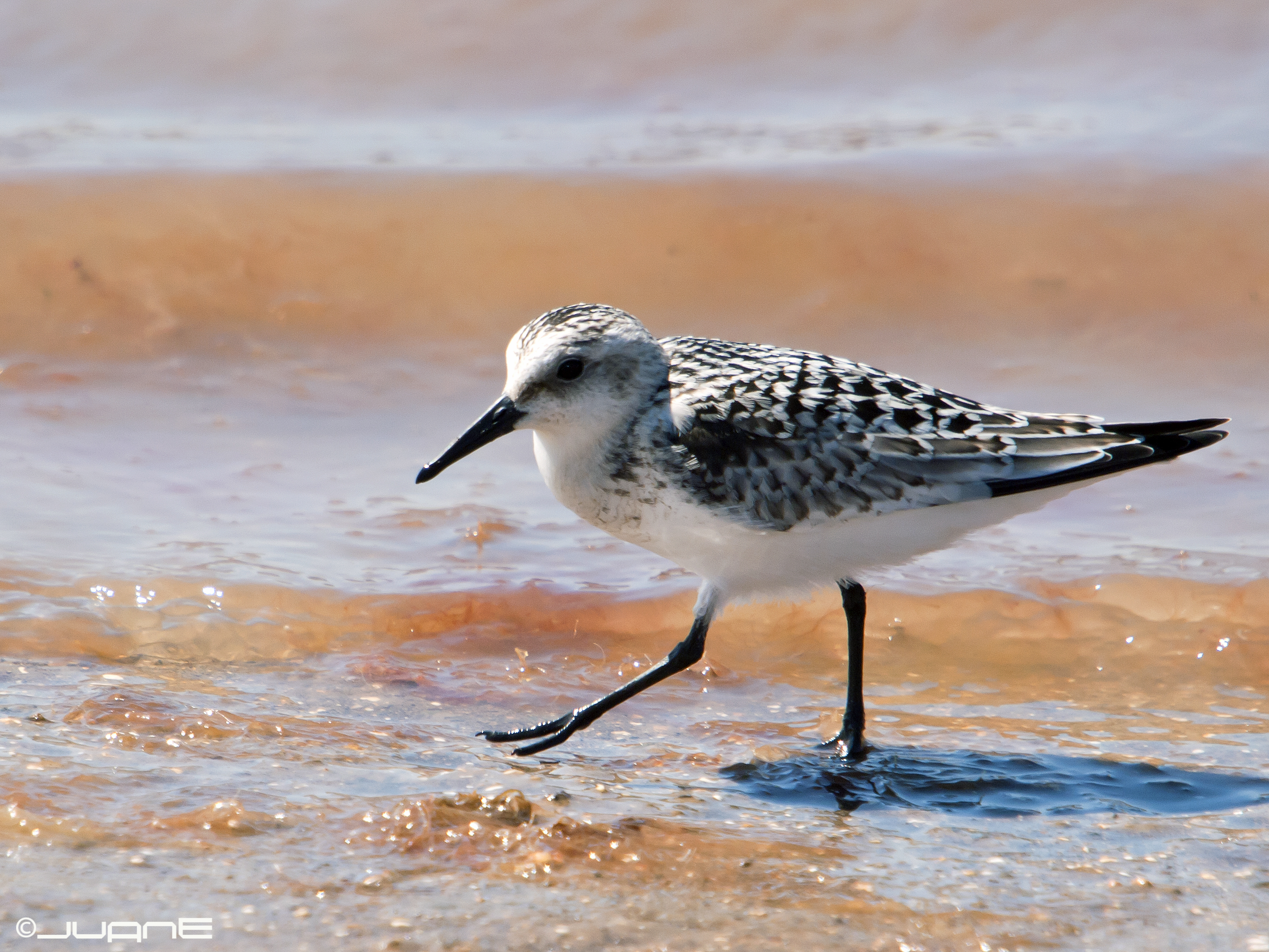 E-3 + Sigma 50-500